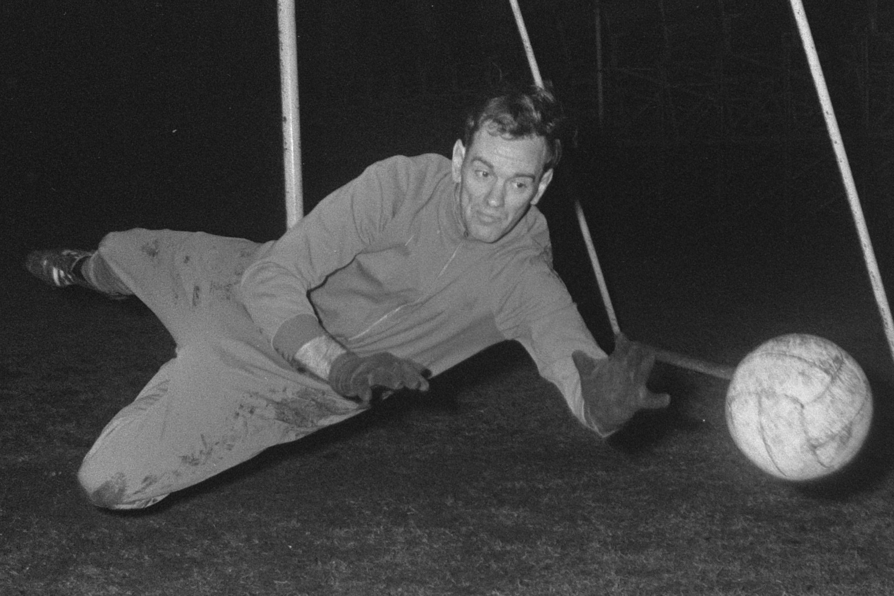 Training Glasgow Rangers in Olympisch Stadion keeper Martin traint ( nr. 9 en 10)